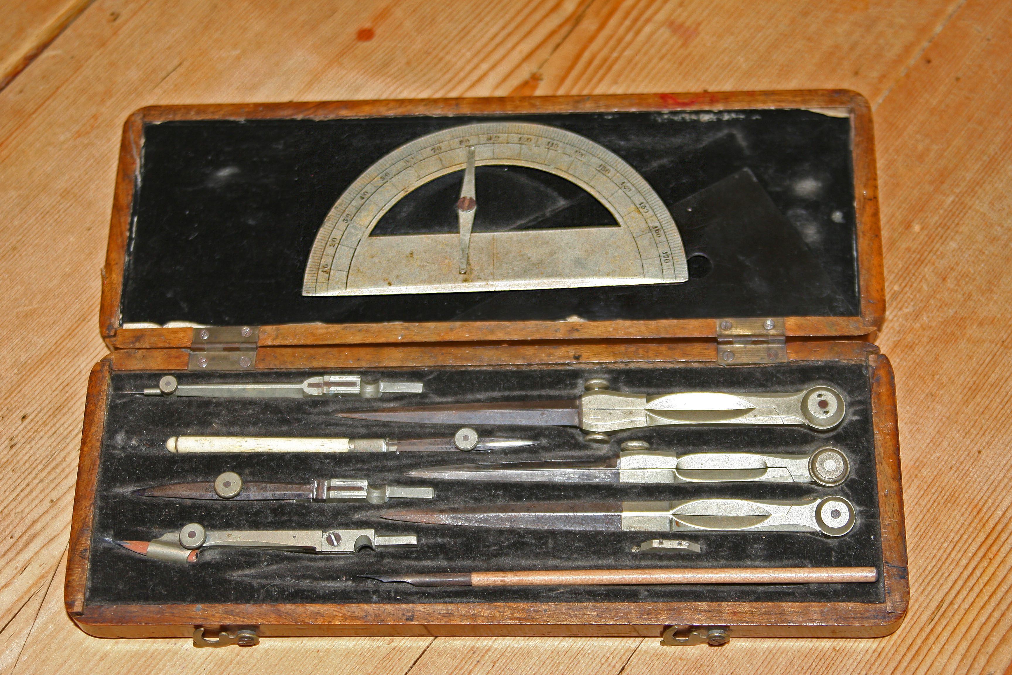 Reißzeug